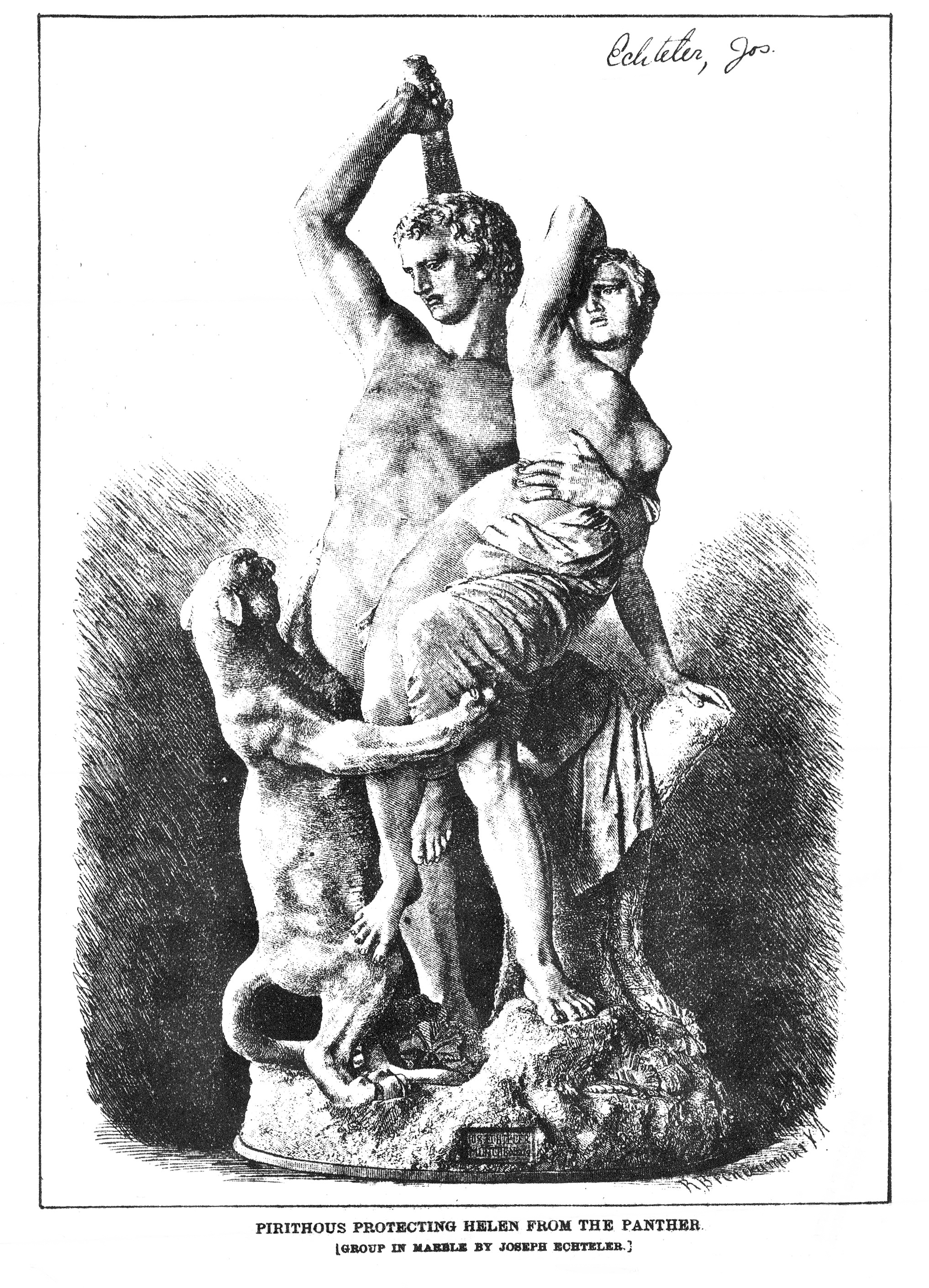 Kollosal-Skulptur "Pirithous' Kampf um Helena" von Joseph Echteler (genaues Jahr unbekannt). Abbildung (Holzschnitt?) von Richard Brend’amour (genaues Jahr unbekannt).